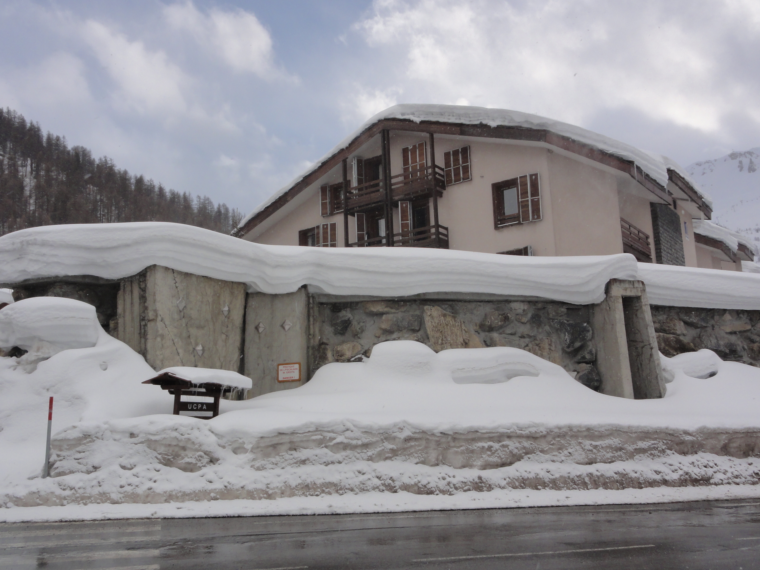 UCPA de Val d'Isère (Savoie - France), en mars 2013; Vue depuis la route départementale du Col de l'Iseran et dans la direction de l'avalanche de février 1970